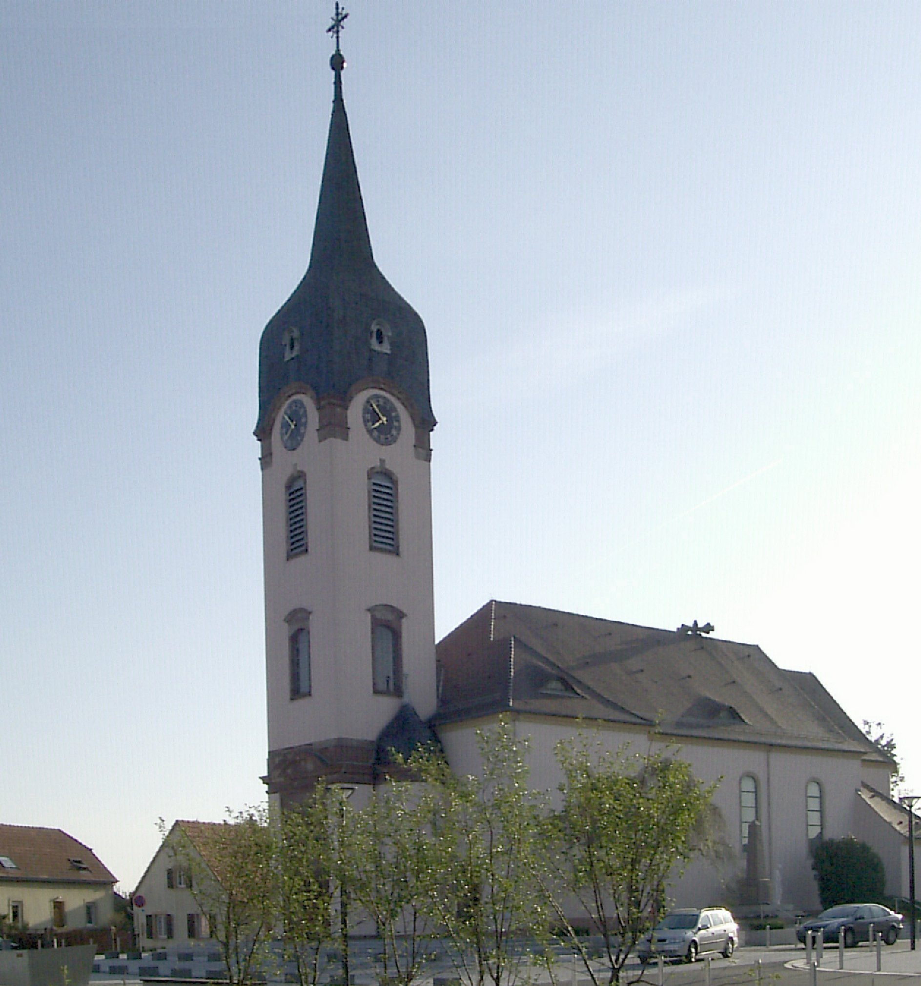 L'église Saint-Michel (1756) à Bantzenheim